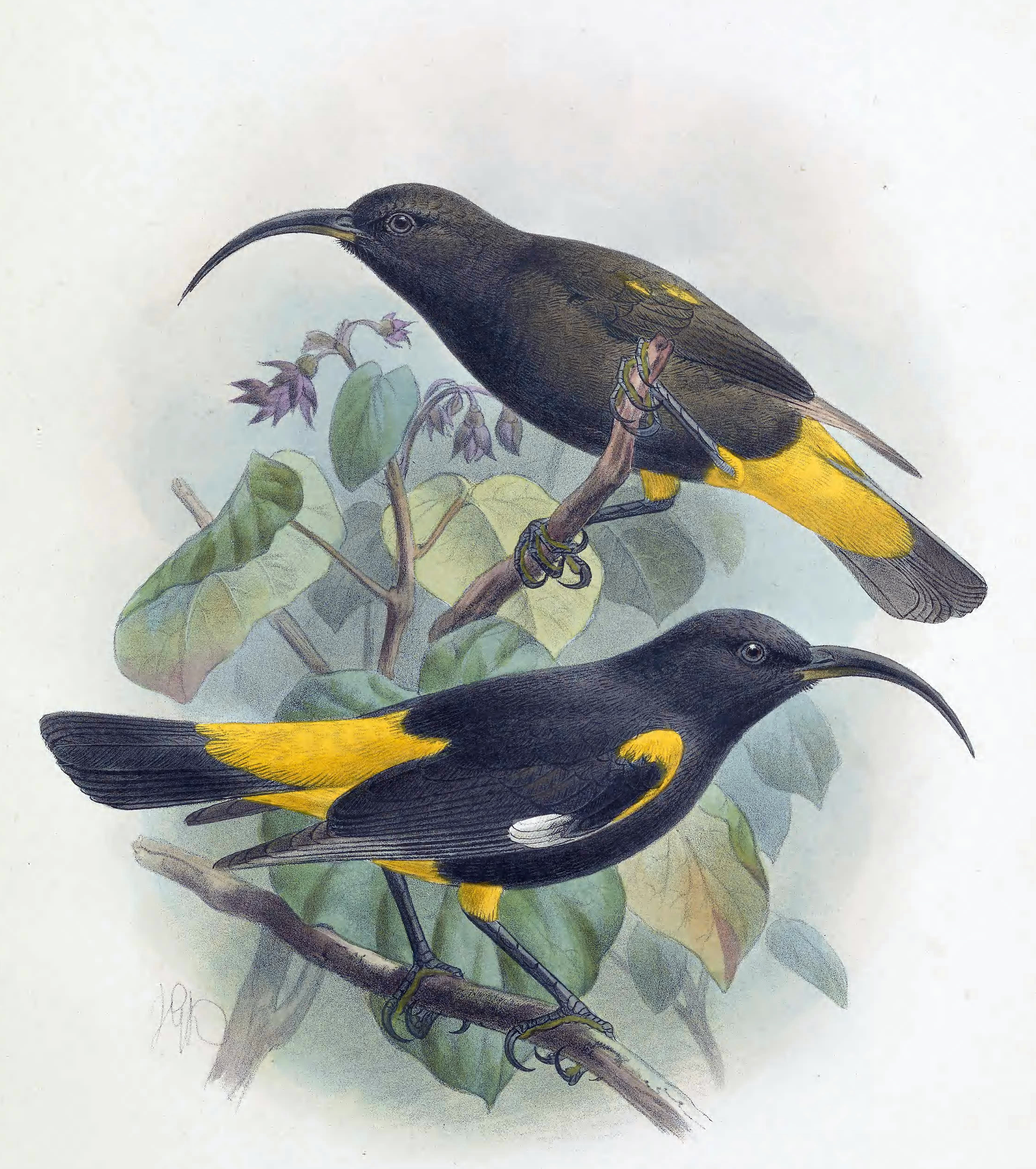 Drepanis pacifica (Hawaii Mamo)